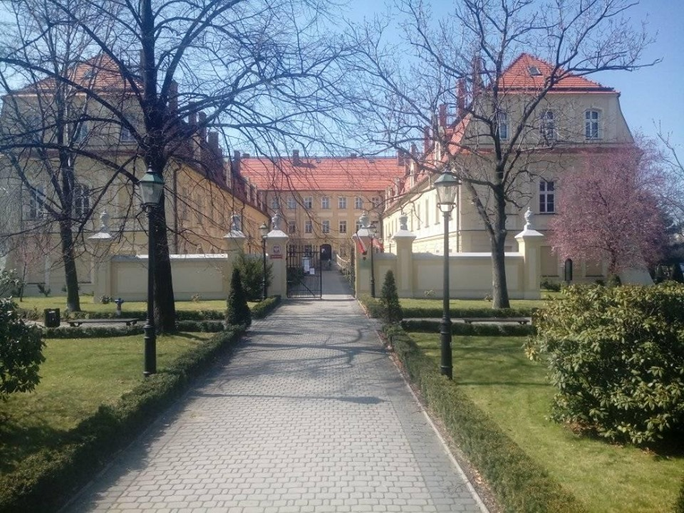 Rybnik Zamek